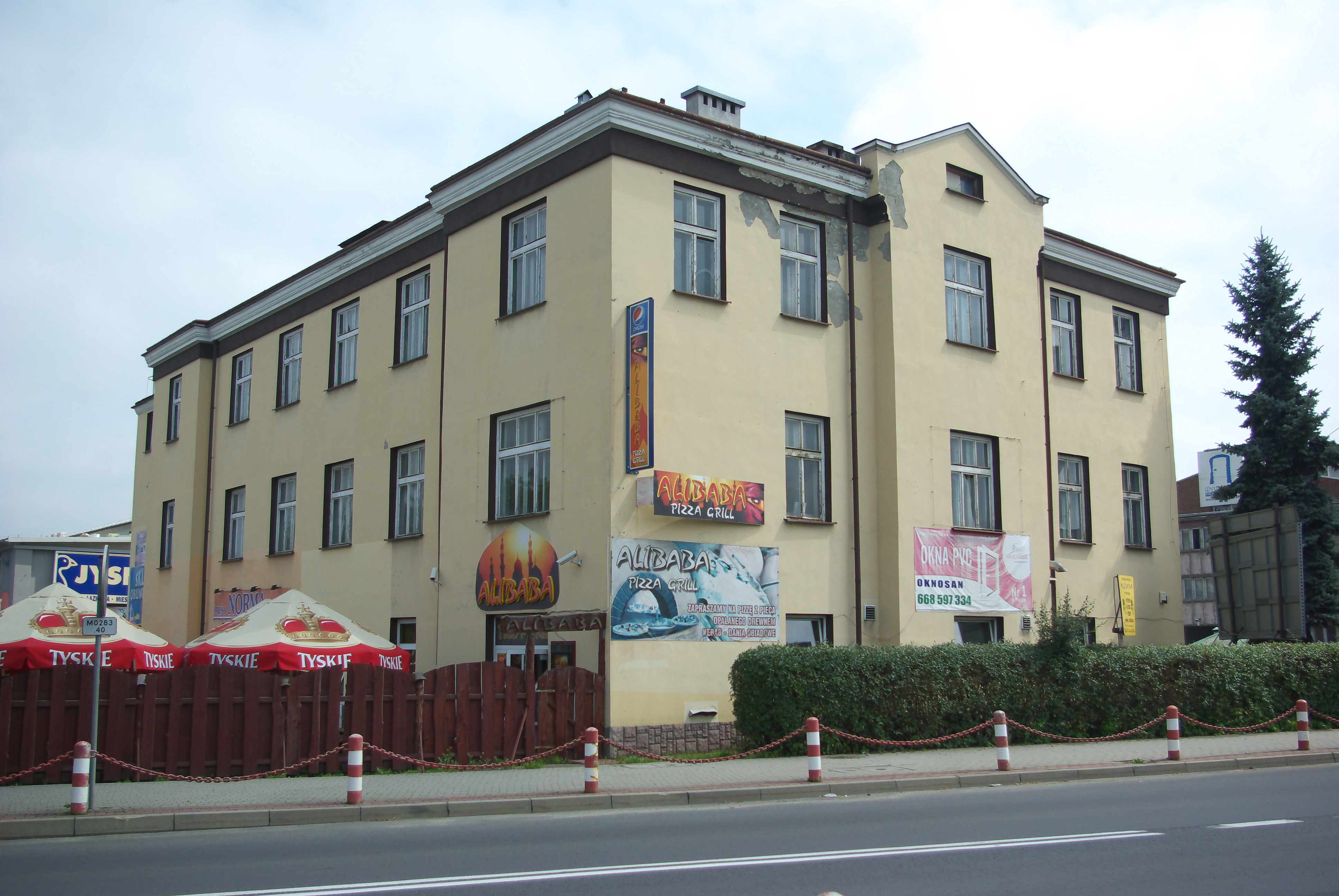 Budynek przy ul. Kazimierza Lipińskiego 109 w Sanoku